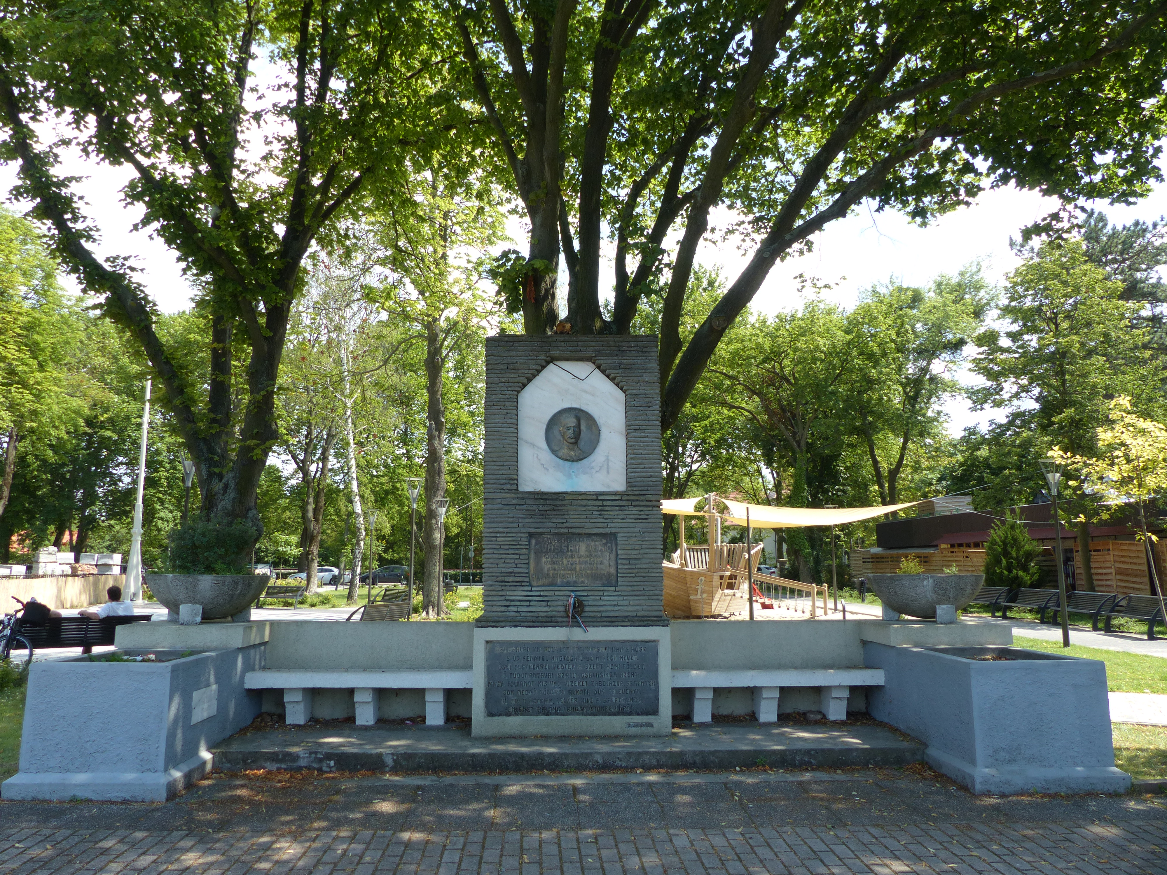 A felvétel 2016. július 2-án készült Balatonföldváron. Kvassay Jenő emlékműve.